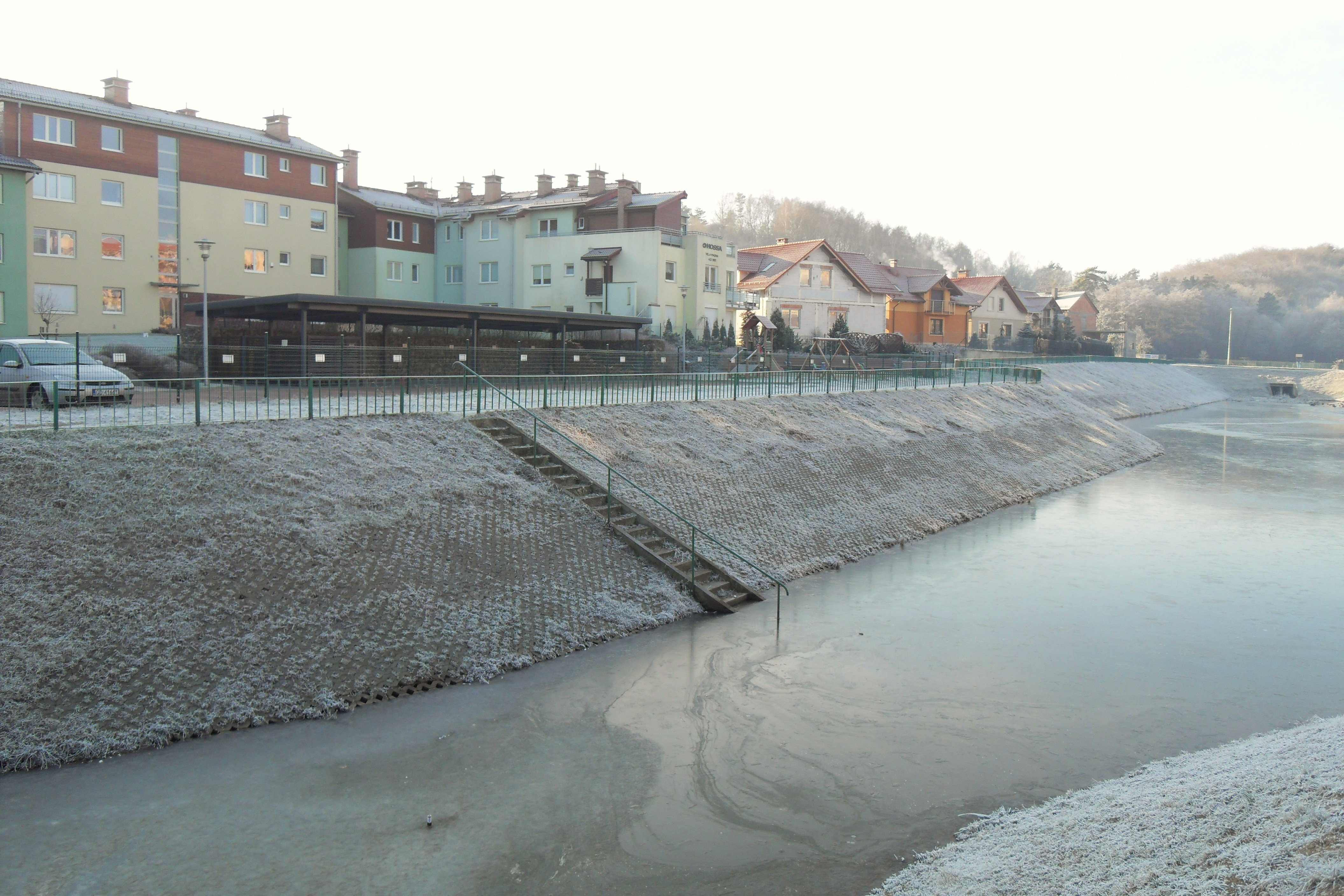 Gdańsk Nowiec i Strzyża (zbiornik retencyjny Nowiec II).